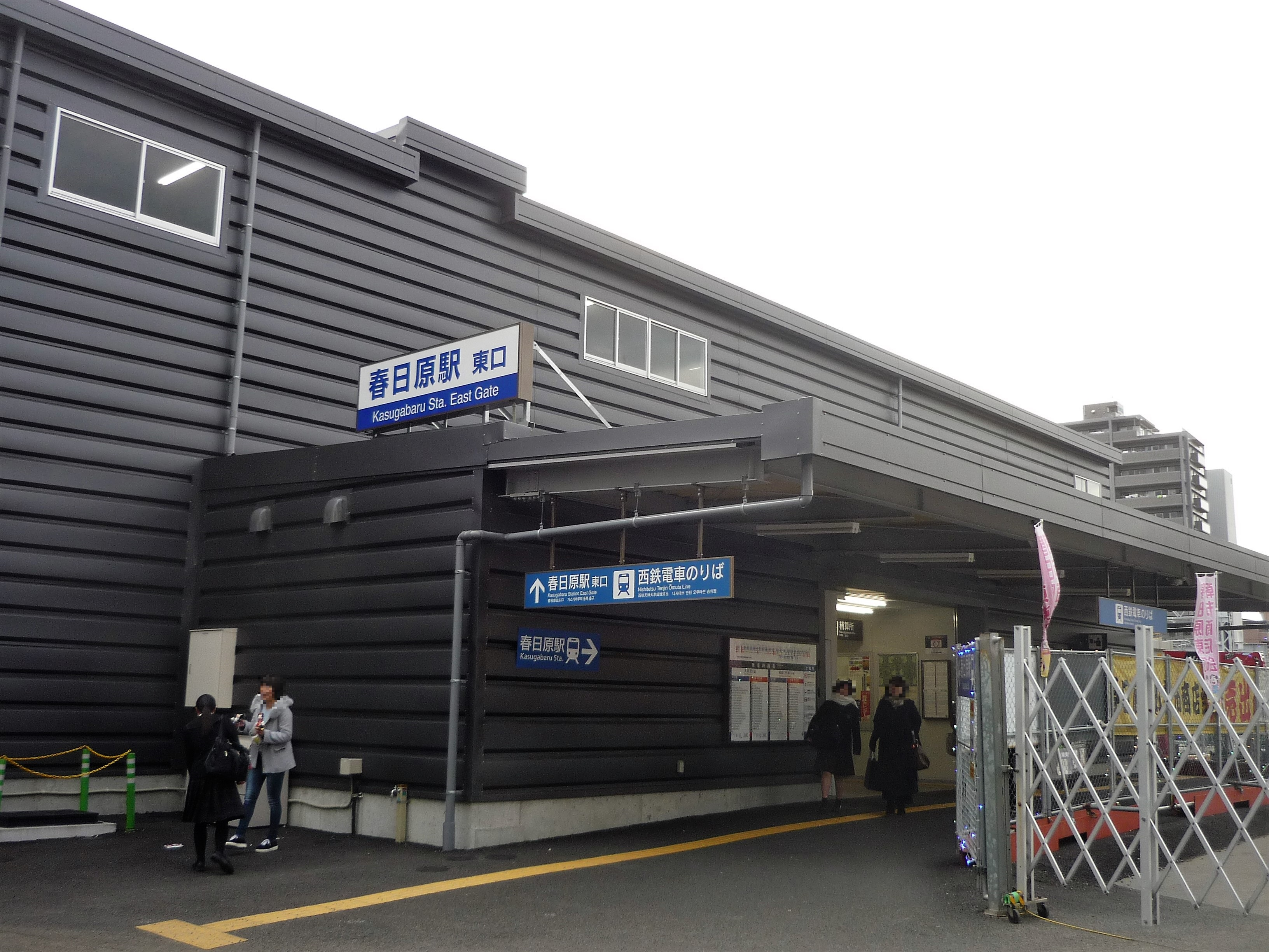 西鉄・春日原駅東口の仮駅舎 Panasonic Lumix DMC-FS3